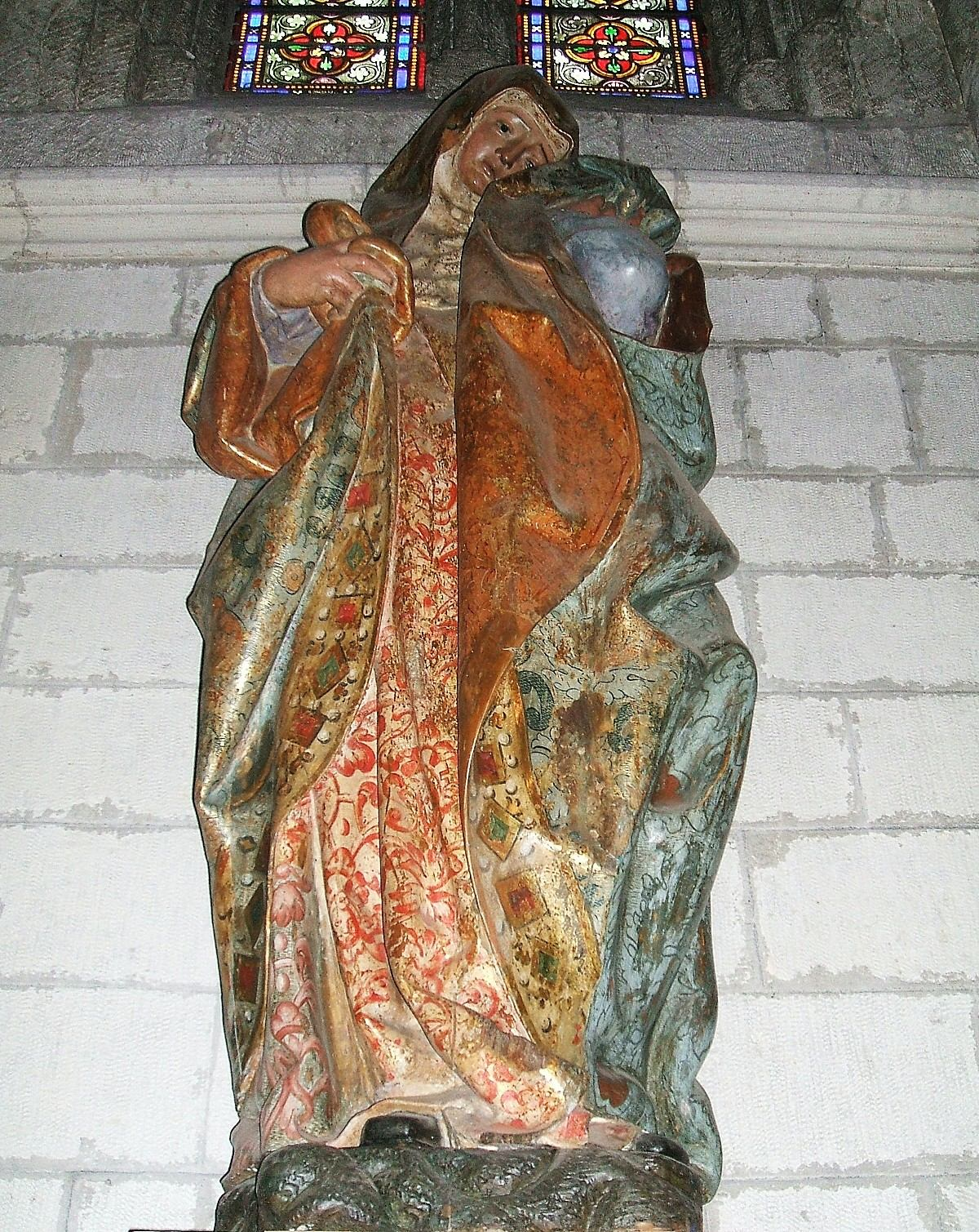 Virgen de los Dolores, Iglesia de San Pedro Apóstol, Vitoria-Gasteiz